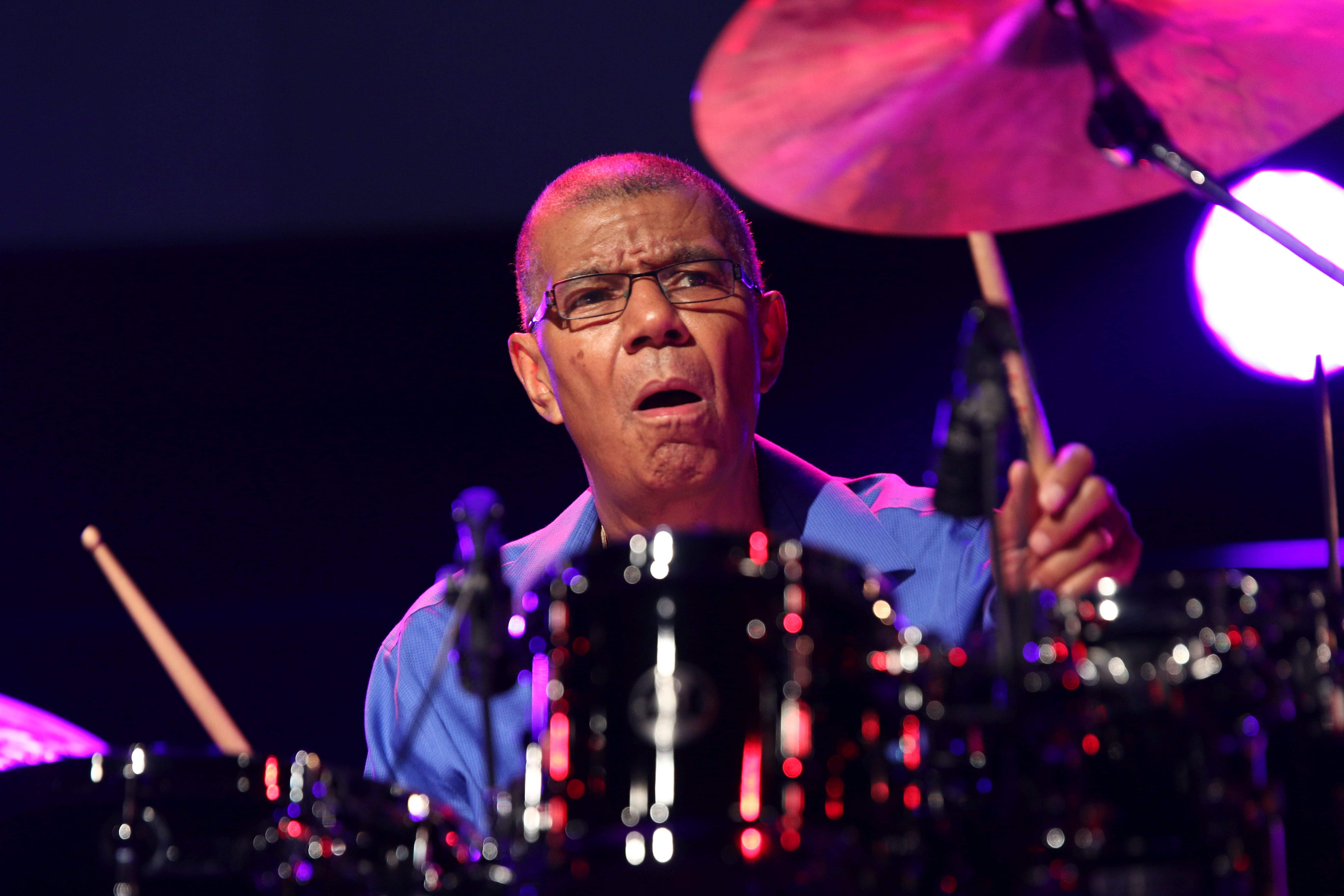 46. Deutsches Jazzfestival Frankfurt 2015: Jack DeJohnette